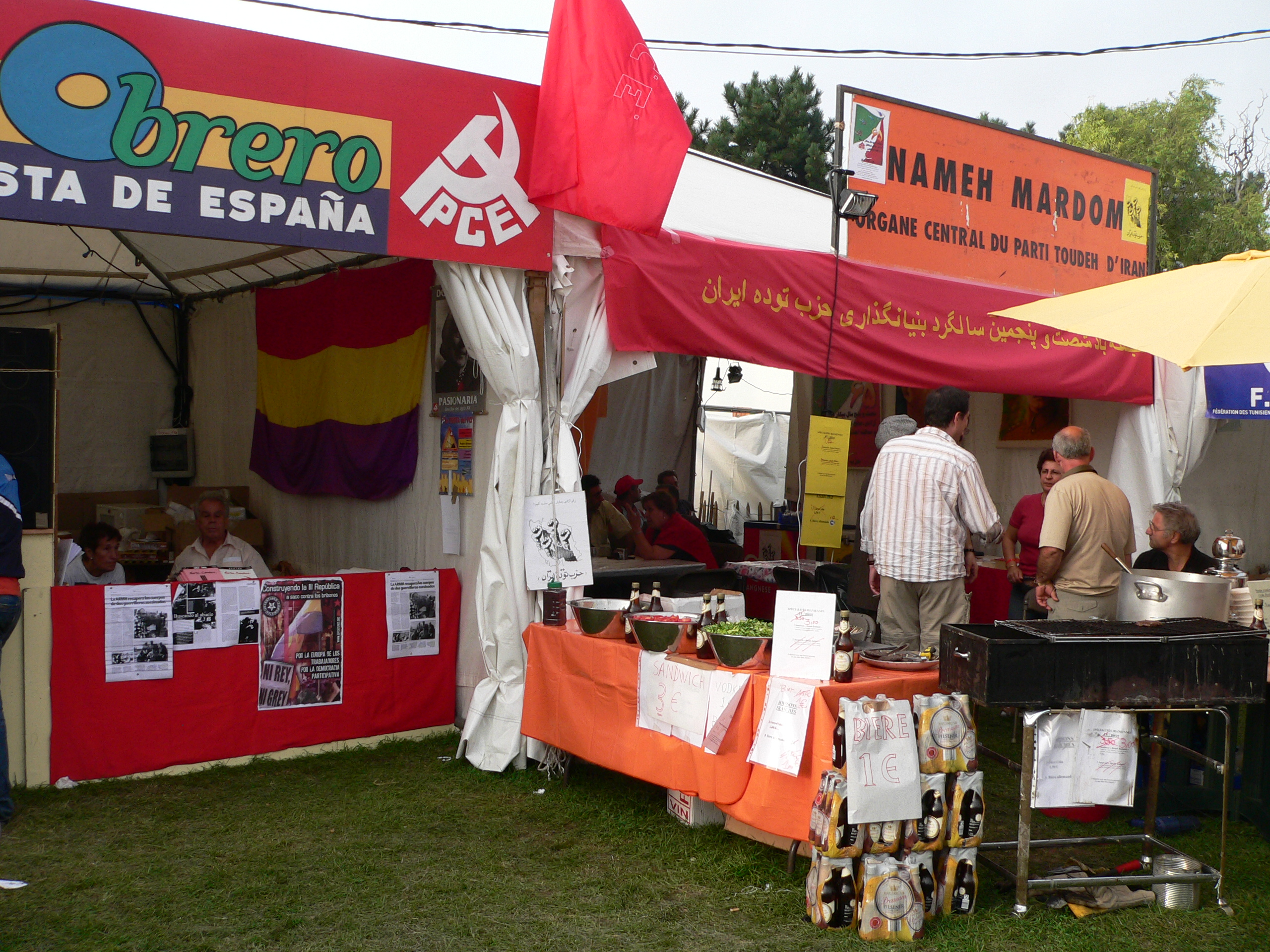 Fête de l’Humanité, 15 July 2006-17 July 2006